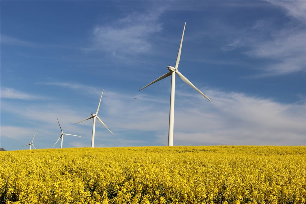 Eoliennes dans le département de la Meuse